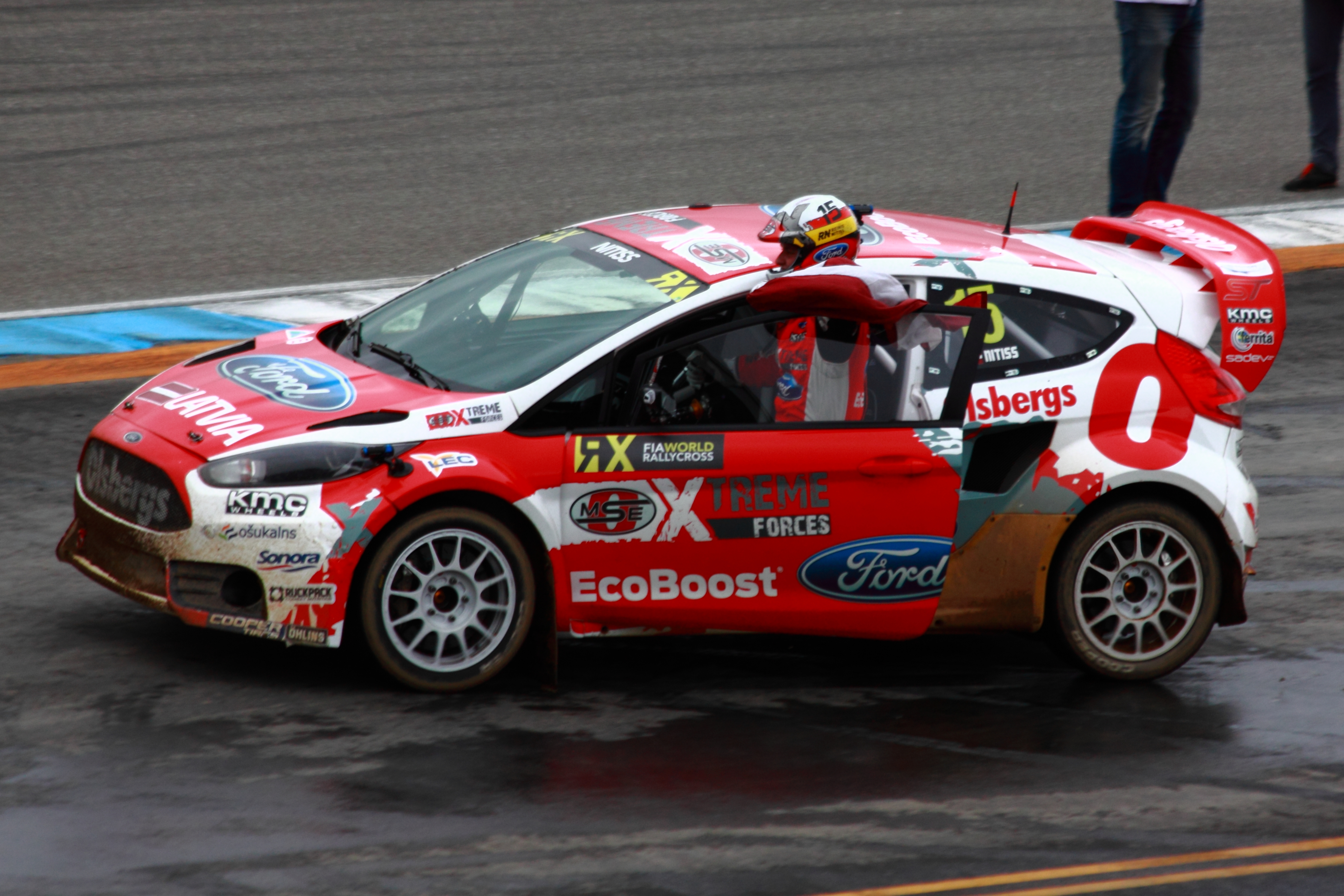 Reinis Nitiss, Ford Fiesta ST, Team Olsberg MSE